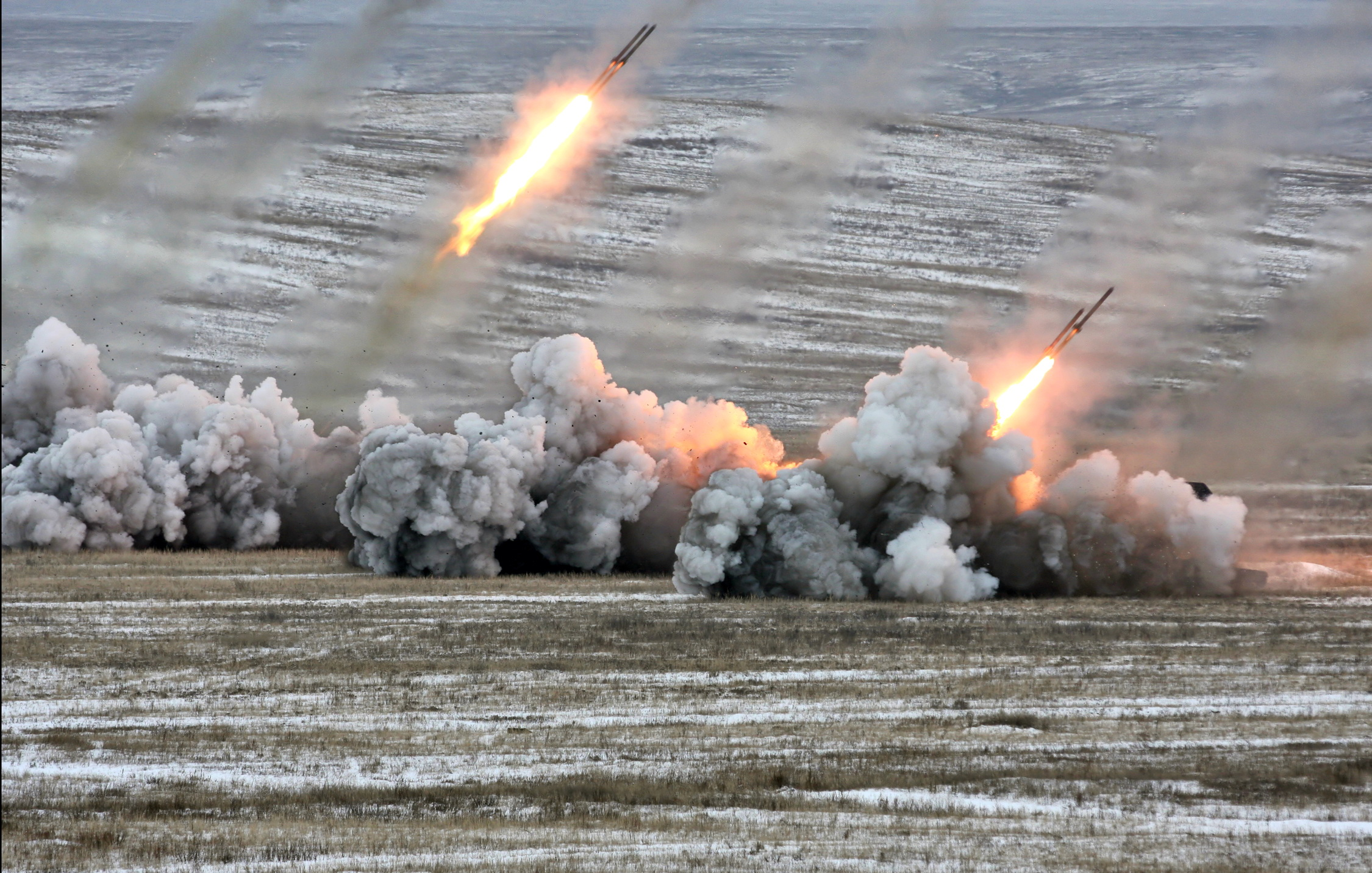 Стрельбы тяжелой огнеметной роты ТОС-1А (Heavy flamethrower company of TOS-1A combat vehicles firing)